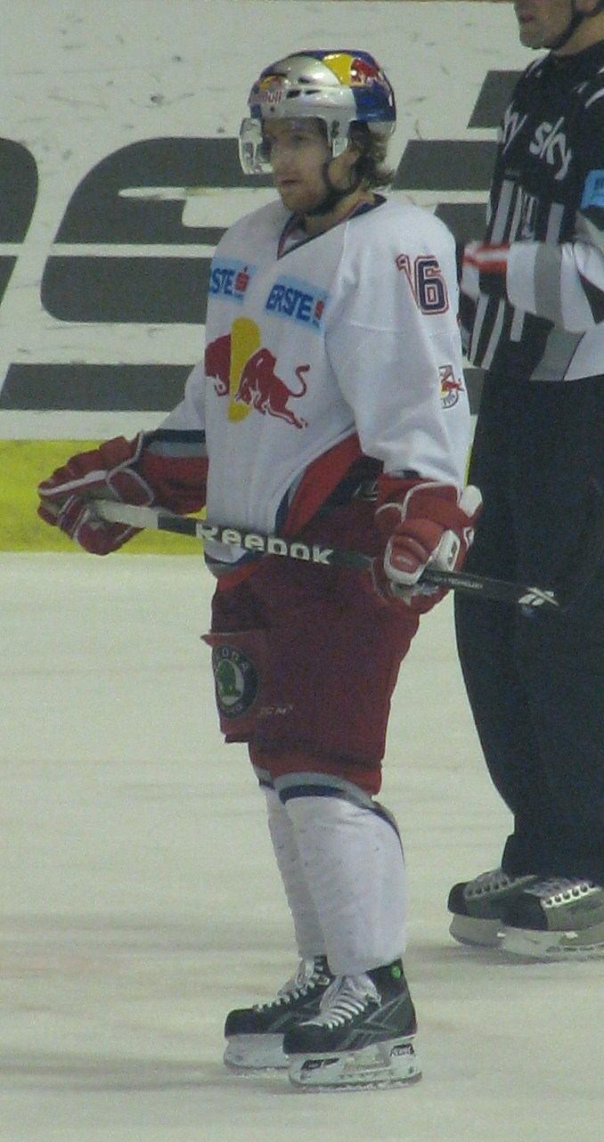 Ryan Duncan